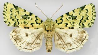 Bryolymnia viridata female